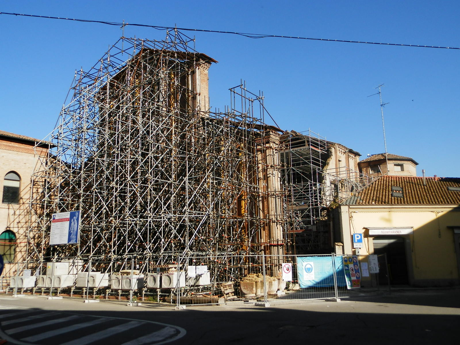 Fotografia che ritrae la Chiesa di San Francesco d'Assisi durante i lavori di messa in sicurezza e costruzione della copertura provvisoria